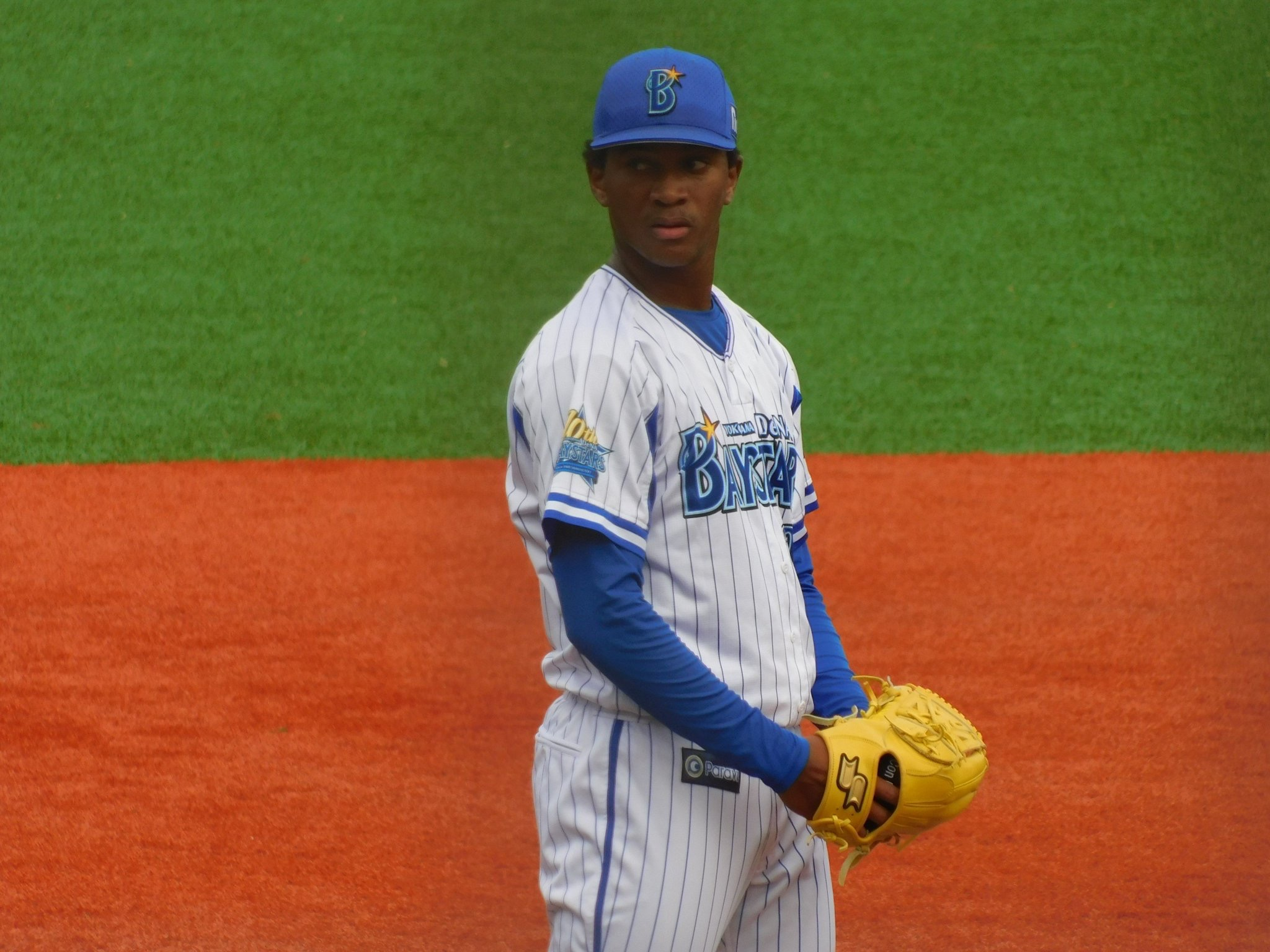 育成選手 （npb) レミーコルデロ投手